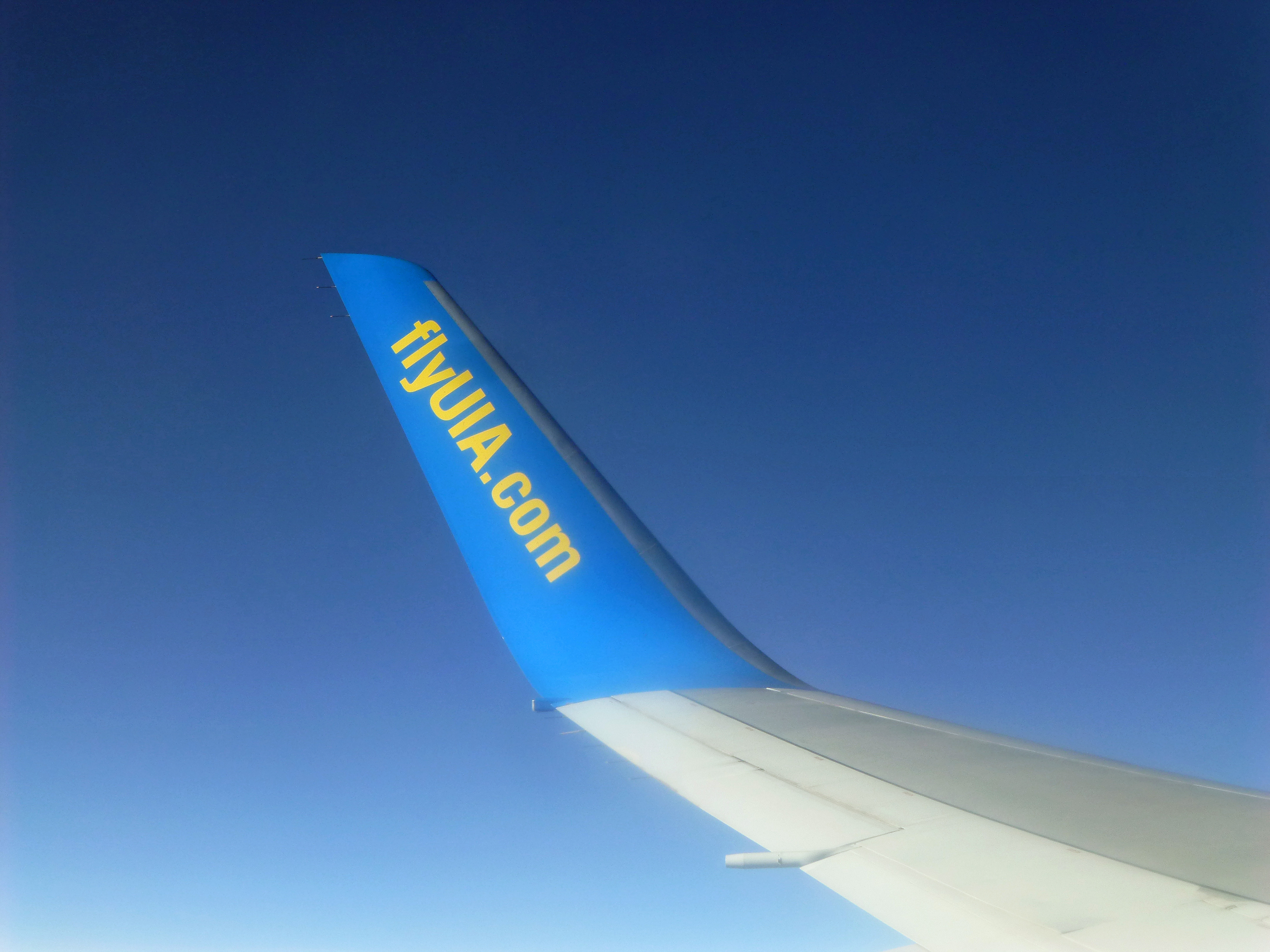 Appareil de la compagnie Ukraine International Airlines (UIA)